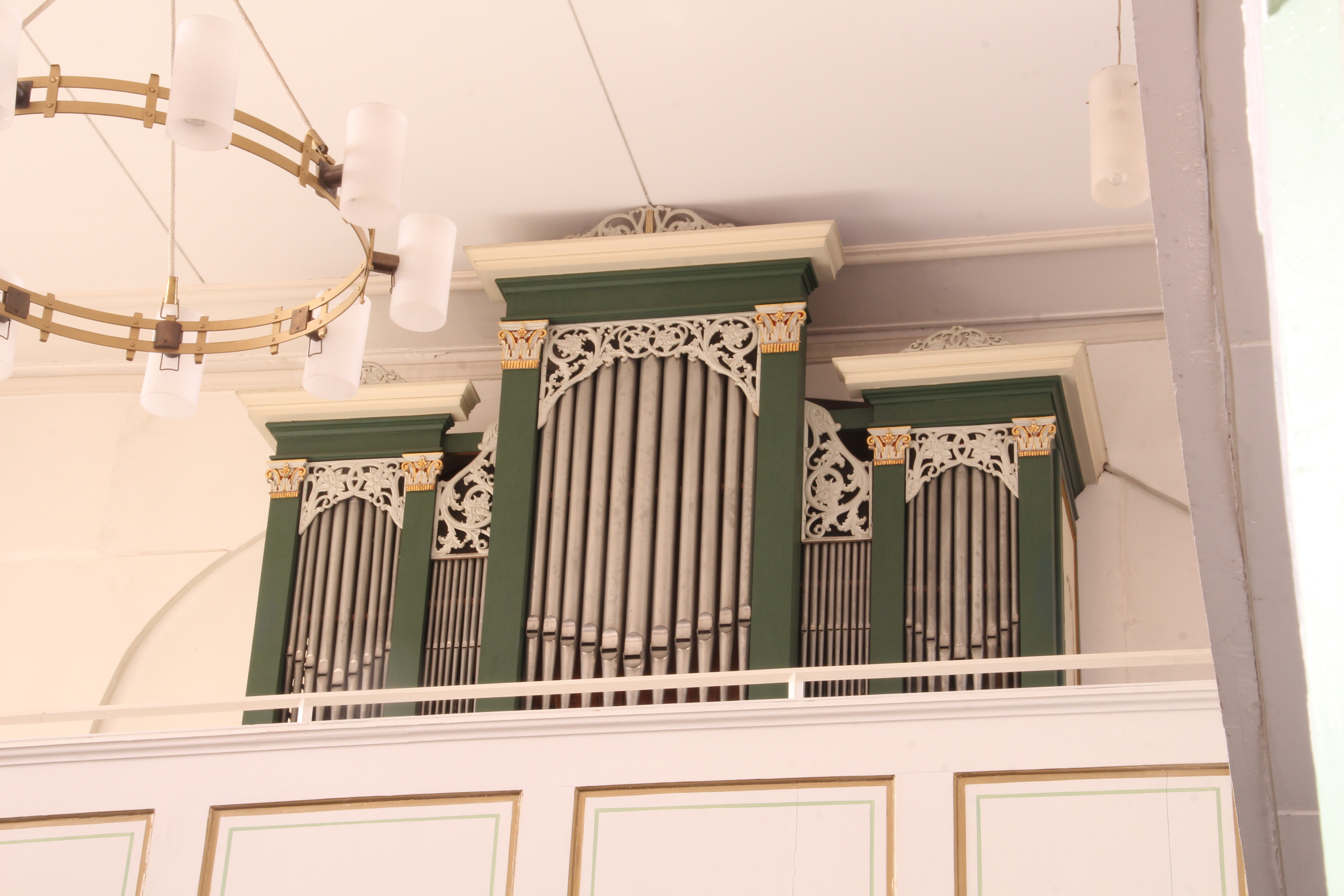 Siehe Bild und Dateiname